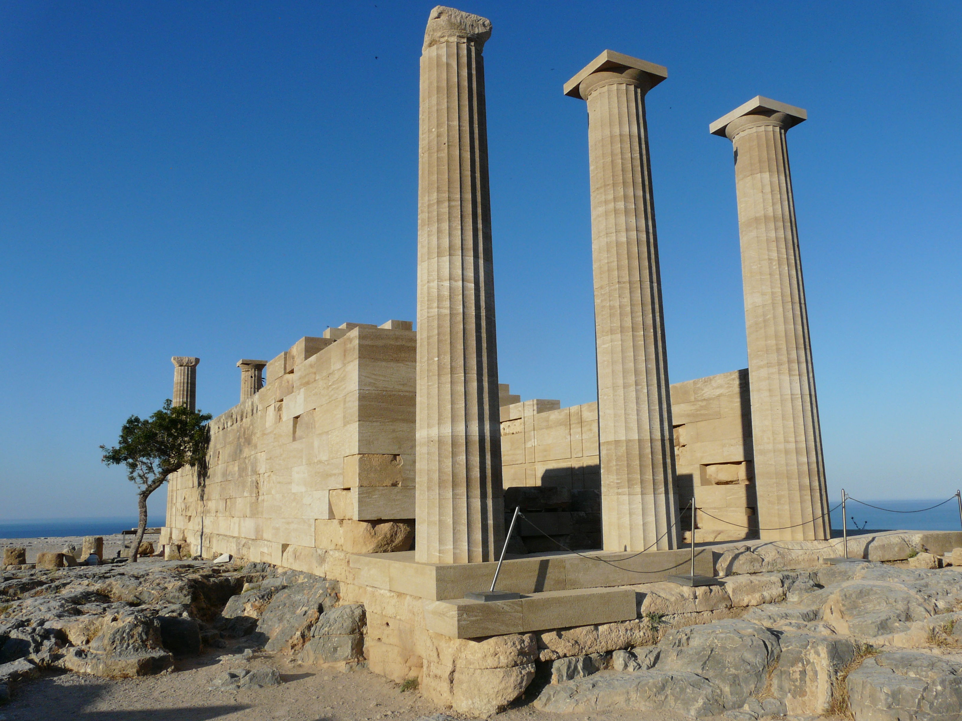 Lindos, Rhodes